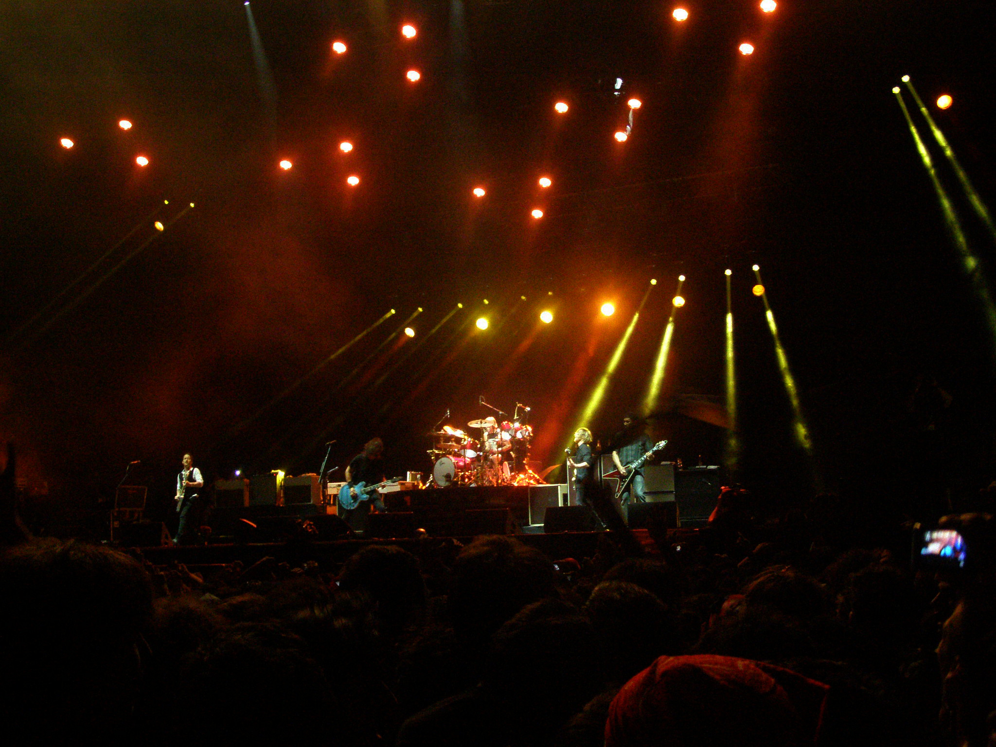 Foo Fighters 1 de abril Lollapalooza Chile